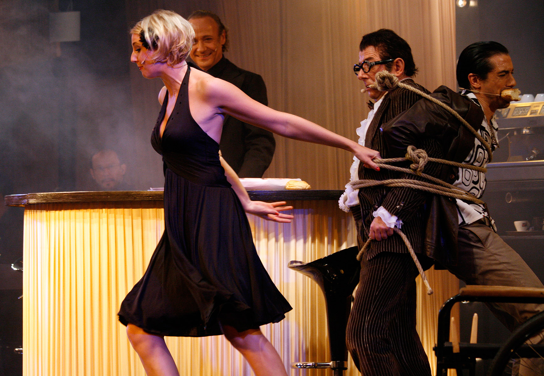 Bettina Mönch, Thomas Stolzeti,Ronald Kuste und Stefano Bernardin während der Premiere der zweiten Saison des Musicals Ti Amo im Metropol in Wien.